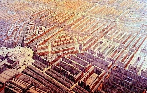 Vogelvlucht Zuiderstation en Plan Zuid, van H.P. Berlage, gezien vanuit het zuidoosten.